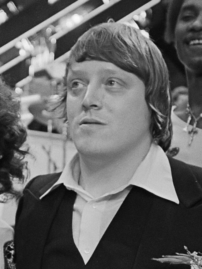 Nationaal Songfestival in Den Haag ; het winnende trio Harmony in de bloemen en tekstschrijver Dik Kooyman (r) en componist Eddy Owens 22 februari 1978